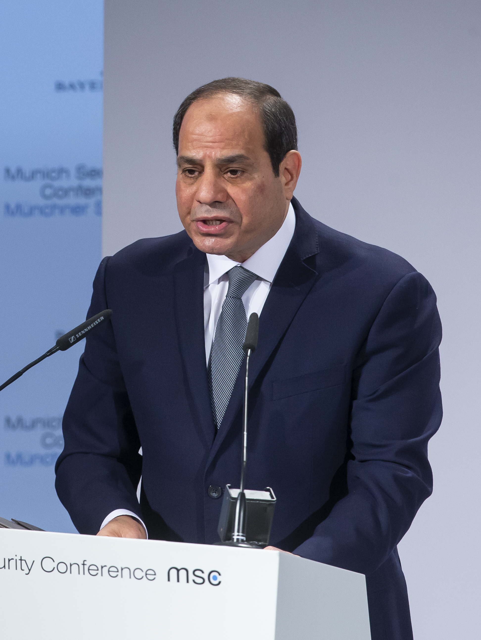 Abdel Fatah al-Sisi während der Münchener Sicherheitskonferenz 2019